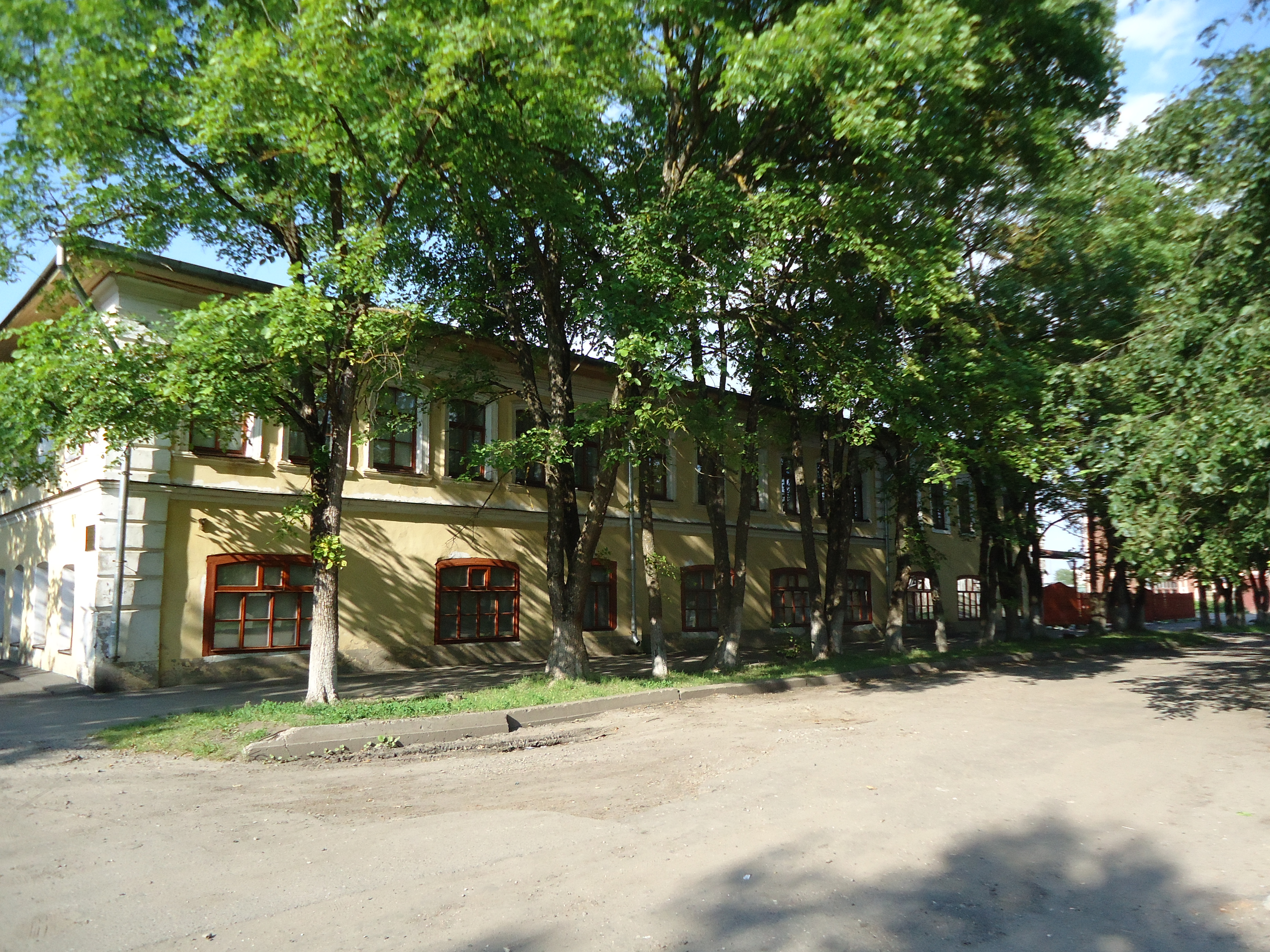 улица Карла Маркса, 67, Грязовец, Вологодская область. Вид на здание с улицы Карла Маркса